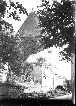 Gut Braunenbruch – Turm